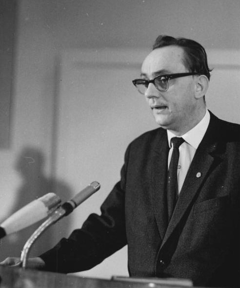 Zentralbild Franke 14.11.1966 Die 1. Jahreskonferenz des Deutschen Schriftstellerverbandes fand in der Zeit vom 2.11. - 4.11.66 in der Kongreßhalle am Berliner Alexanderplatz statt. 350 Teilnehmer der Konferenz (Schriftsteller, junge Autoren, schreibende Arbeiter, Literaturwissenschaftler und Bibliothekare) berieten über die Entwicklung der sozialistischen deutschen Nationalliteratur. UBz: Gerhard Henninger während seines Diskussionsbeitrages.